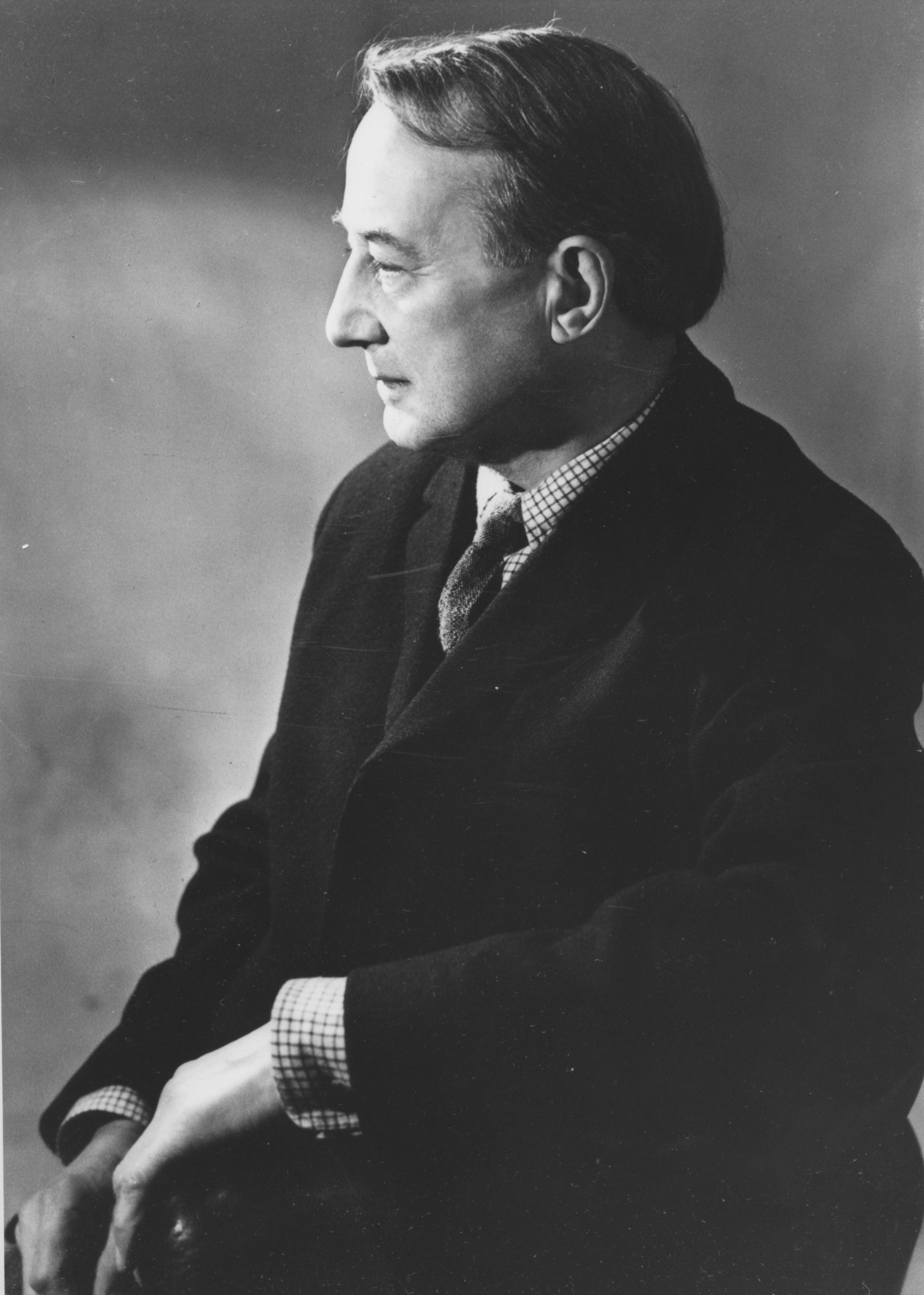 IMAGELIBRARY/578 Persistent URL